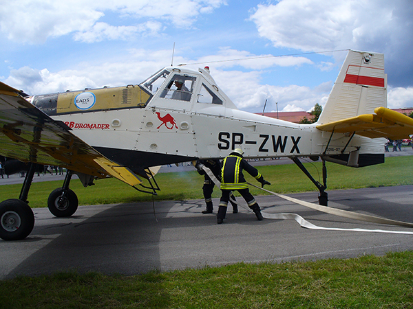 Löschwasserversorgung durch die Feuerwehr